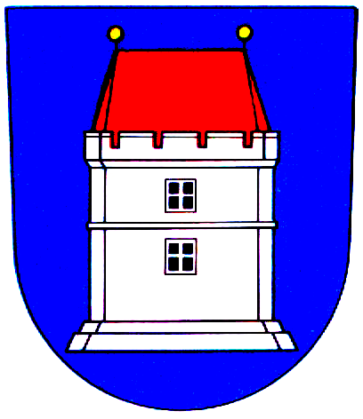 znak obce Vlasatice.